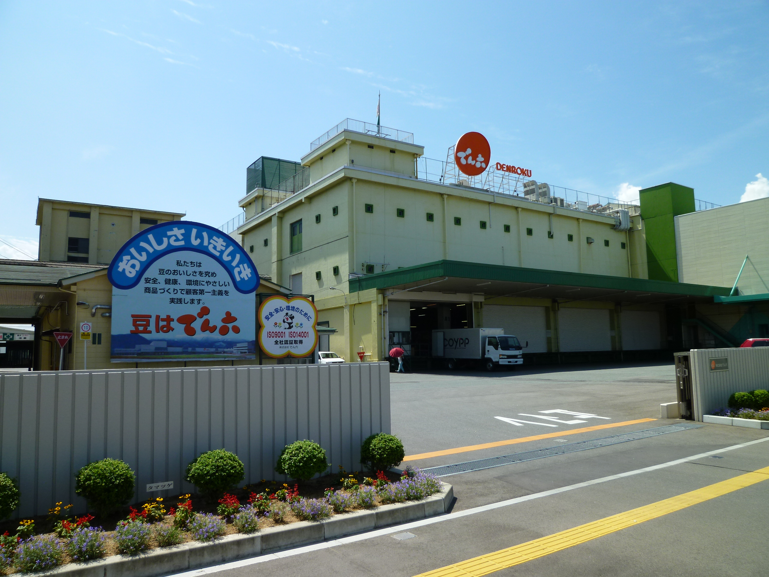 株式会社でん六本社工場